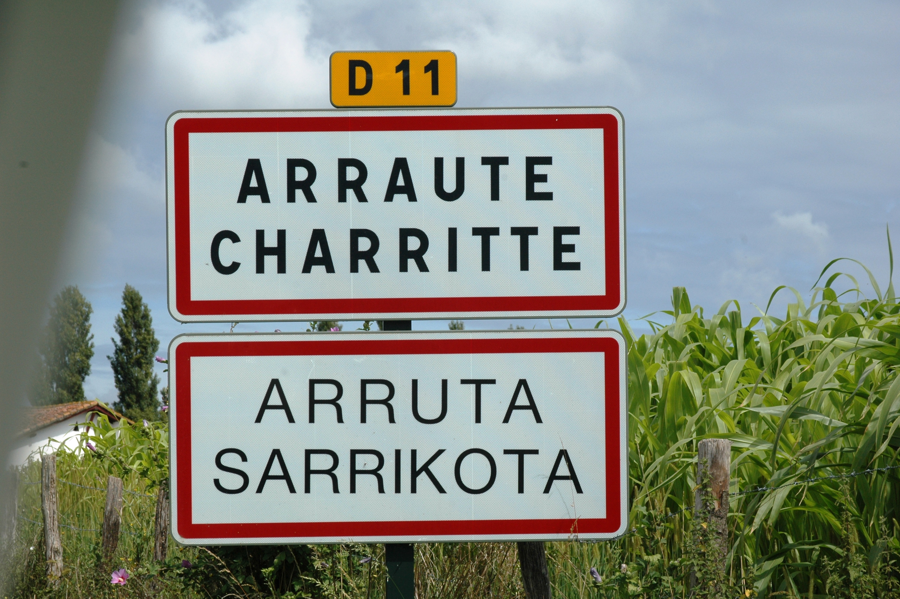 Panneau à l'entrée d'Arraute-Charritte, sur la D11